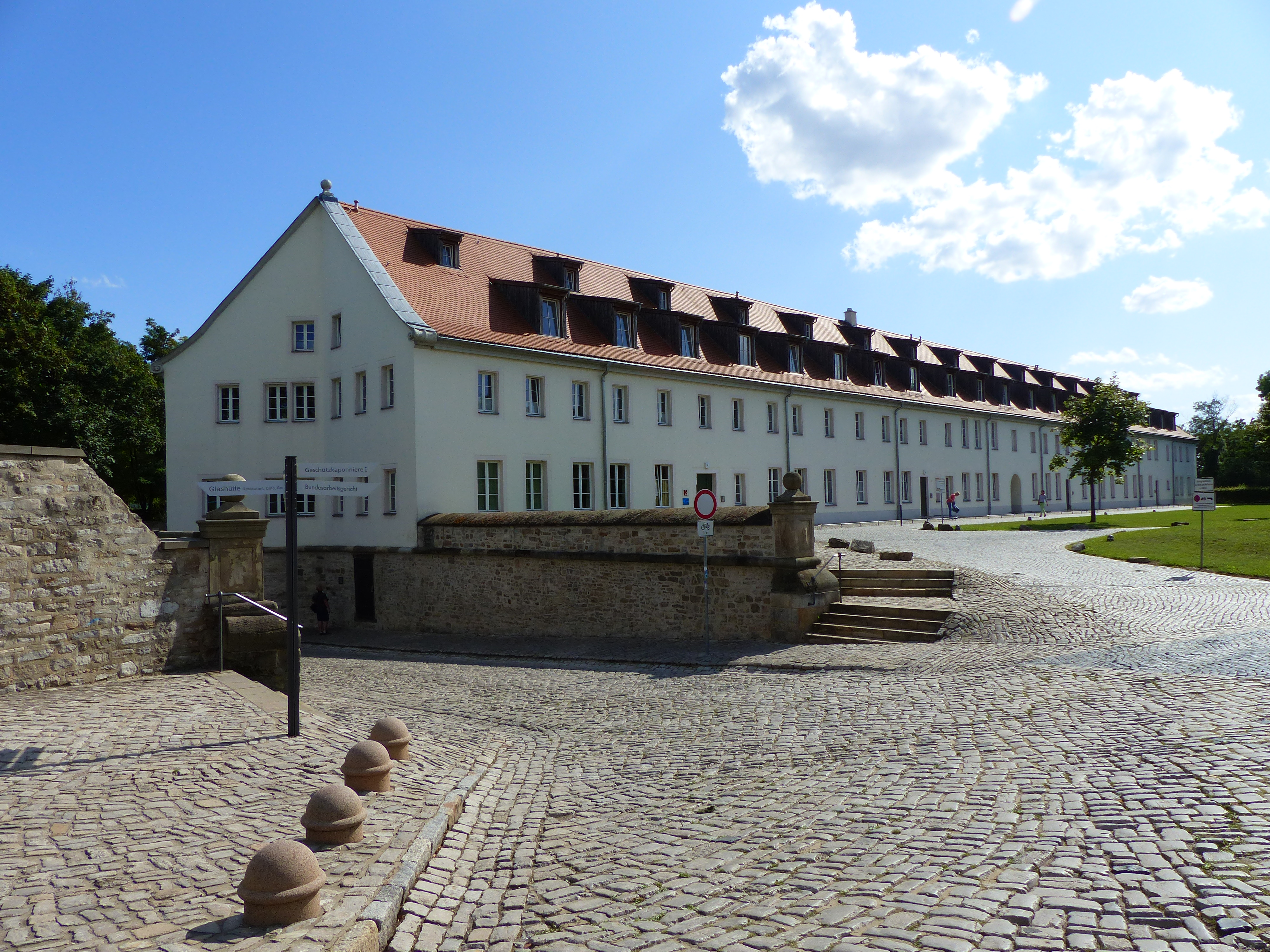 Denkmalgeschütztes Gebäude der Zitadelle Petersberg, Petersberg 4, Erfurt